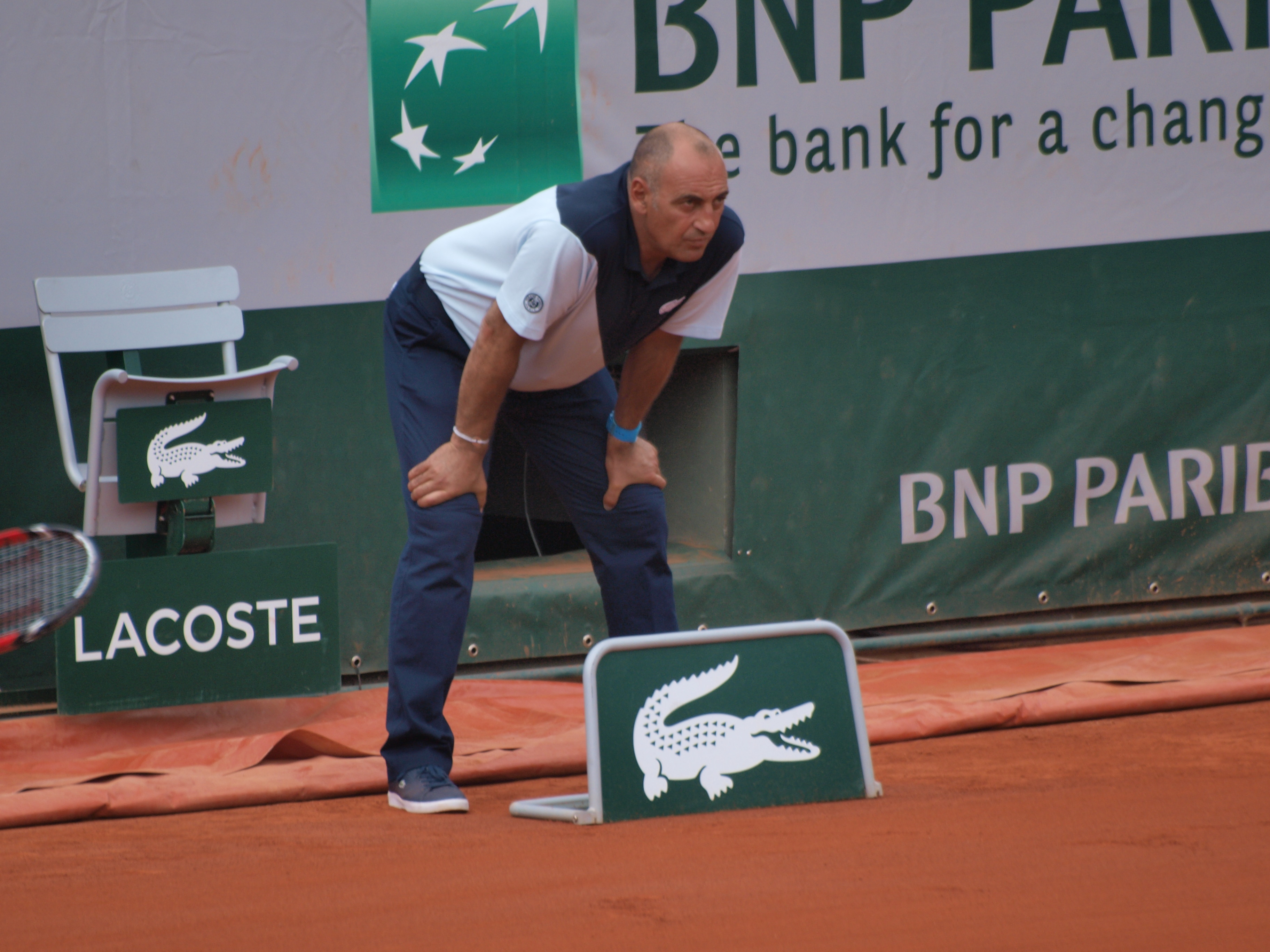 Internationaux de France de tennis, le 2 juin 2014, sur le court Philippe Chatrier